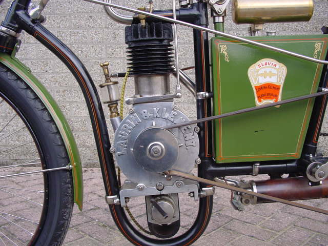 Toestemming van Yesterdays Antique Motorcycles (